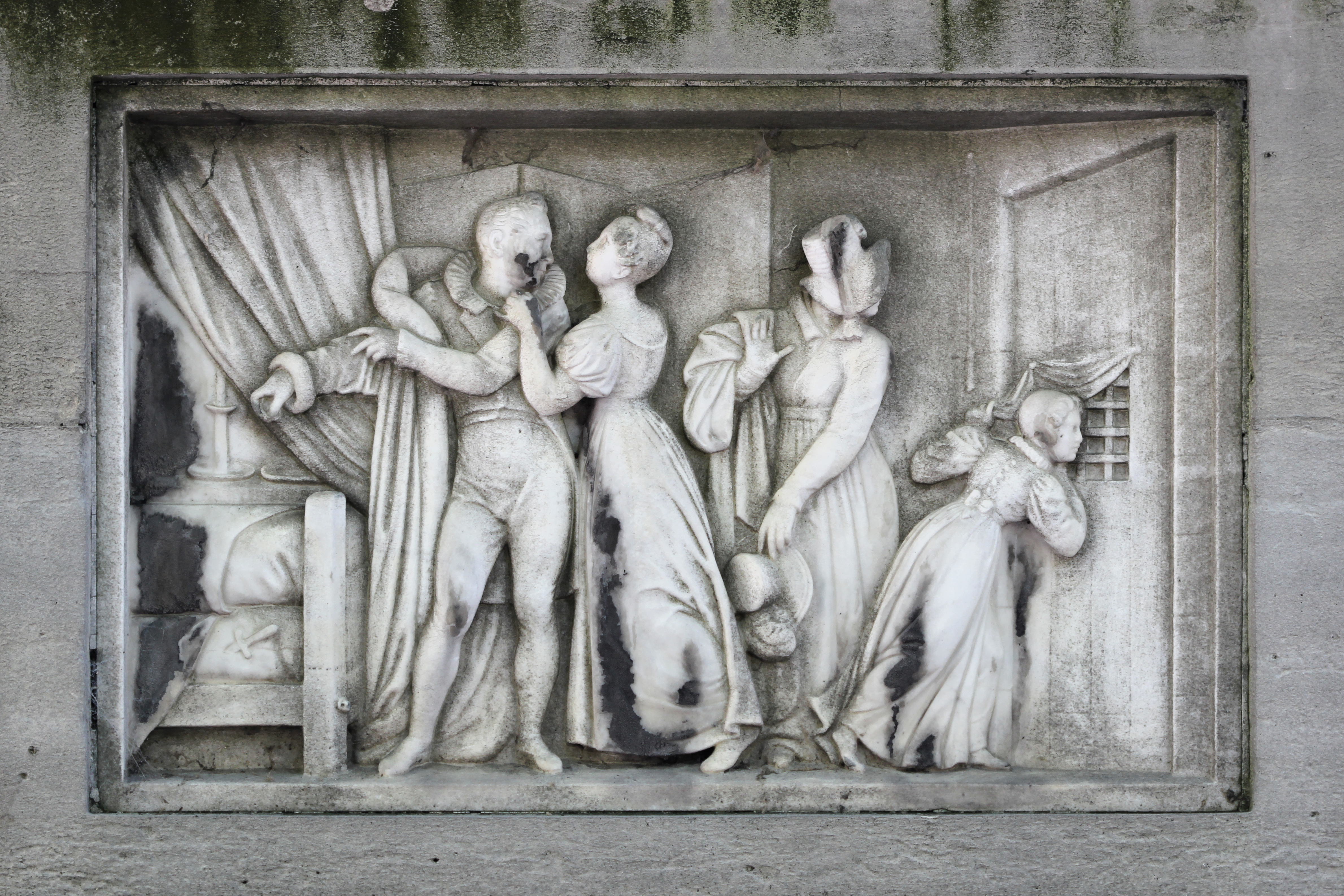 Sépulture d'Antoine Marie Chamans de Lavalette (1769-1830), officier et haut fonctionnaire ; et son épouse, Émilie de Beauharnais (1781-1855). Monument comportant un buste en fonte dans une niche et un bas-relief en marbre représentant l'épisode de l'évasion de M. Lavalette.